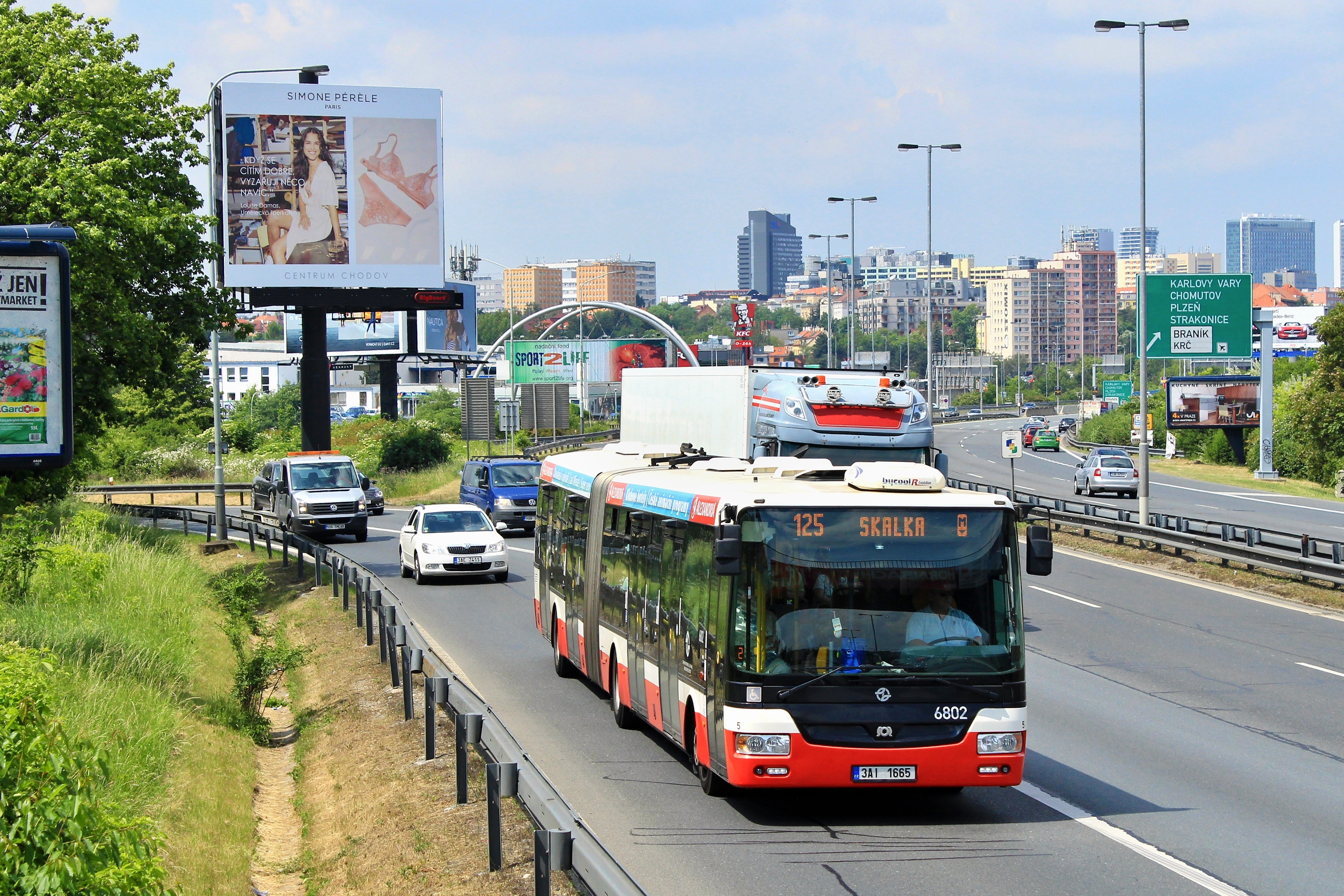 SOR NB 18, Praha, linka 125